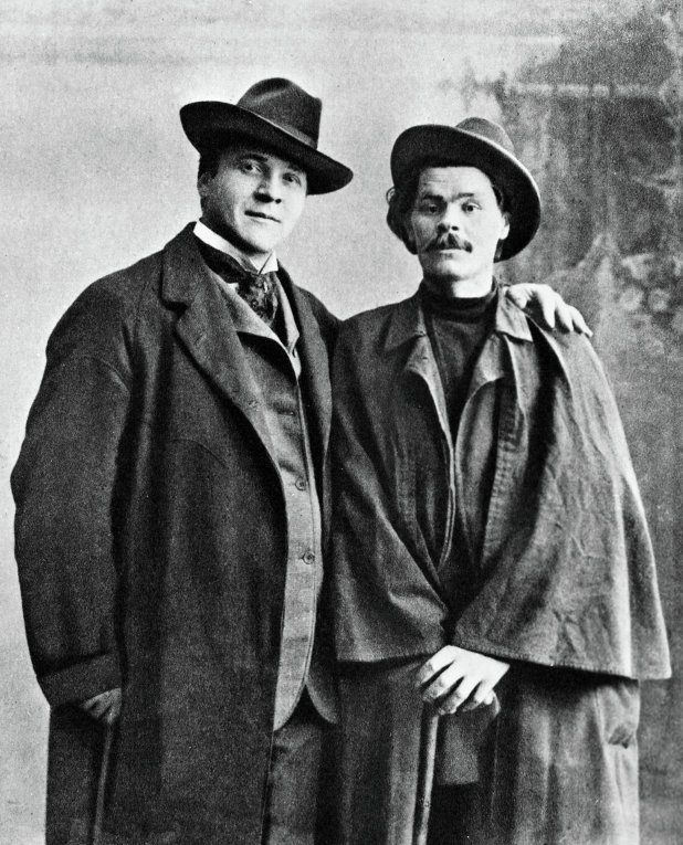 Писатель Максим Горький (справа) и певец Федор Шаляпин (слева)